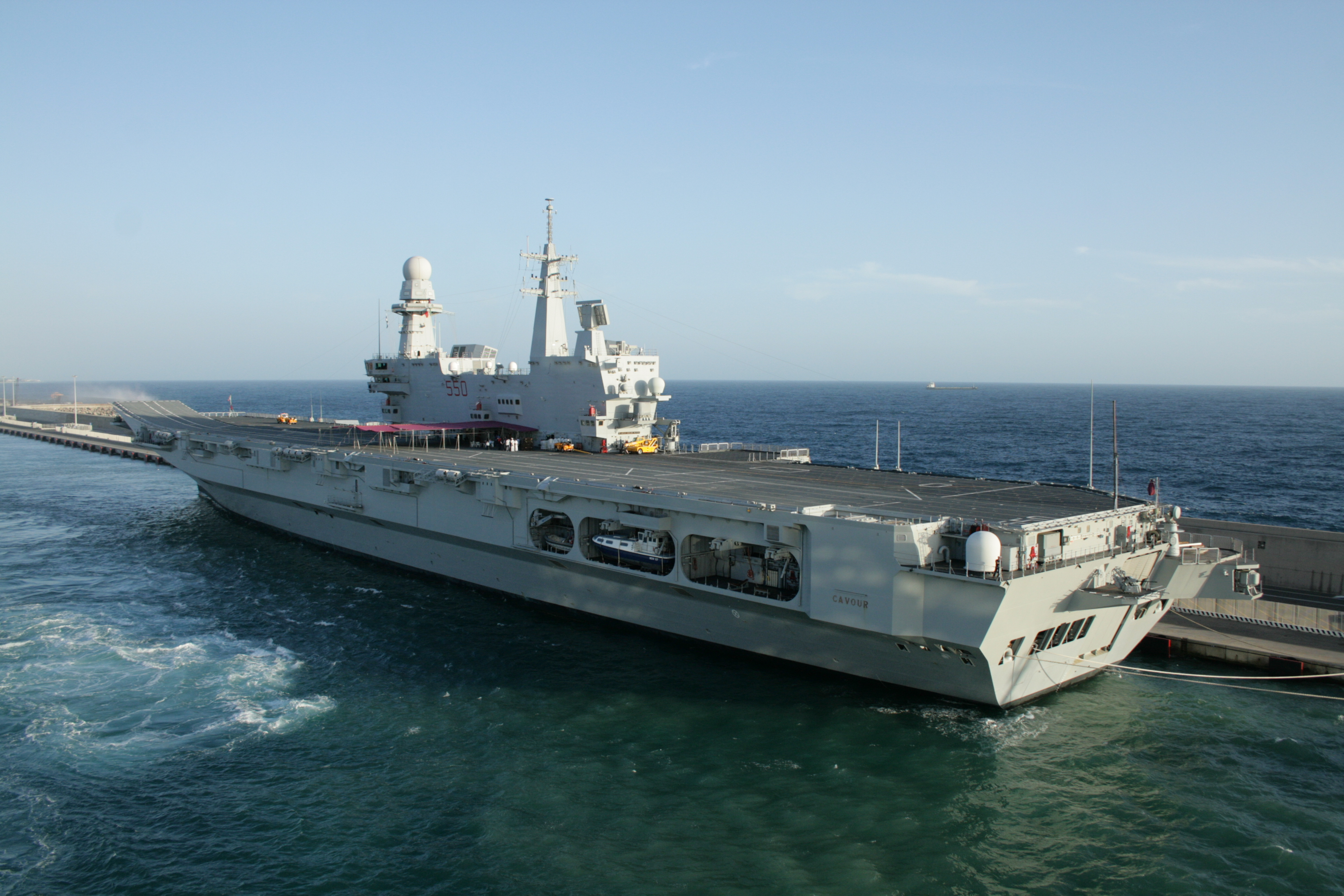 Cavour (550) - Civitavecchia, Italy